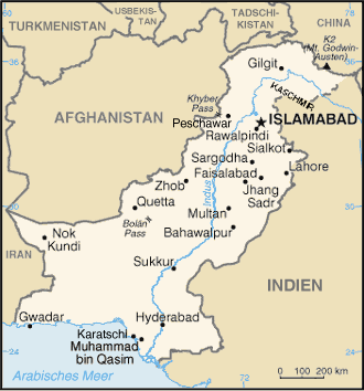 Karte von Pakistan